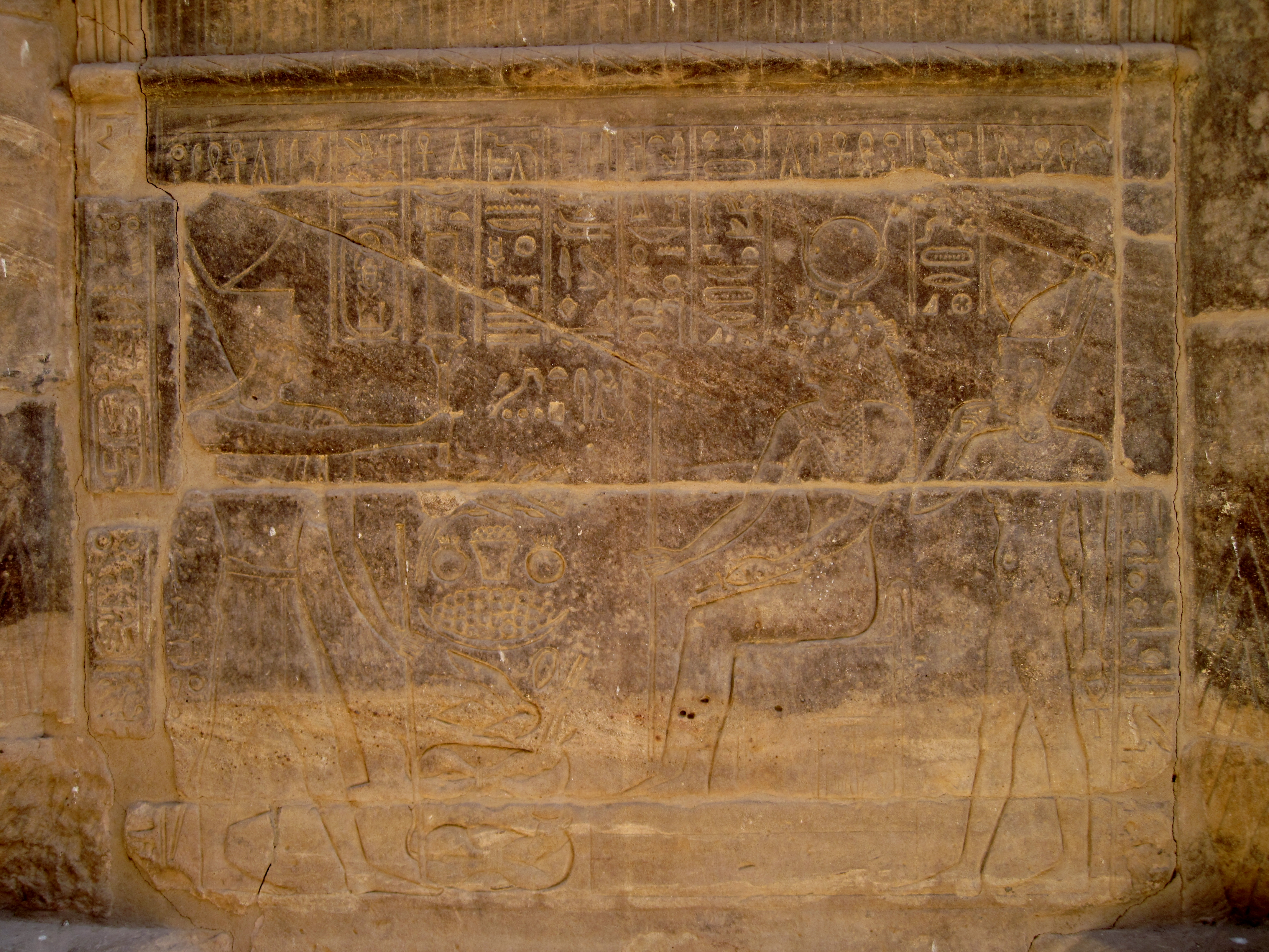 Relief auf einer Interkolumnienmauer am Kiosk des Nektanebos I. vor dem Isis-Tempel von Philae auf der Insel Agilkia, Ägypten